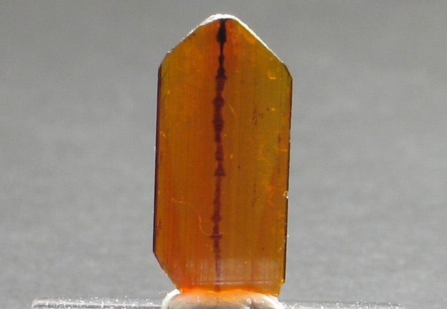 brookit, pochodzenie Pakistan, autor zdjęcia Stowarzyszenie Spirifer, 25.10.2006 r.